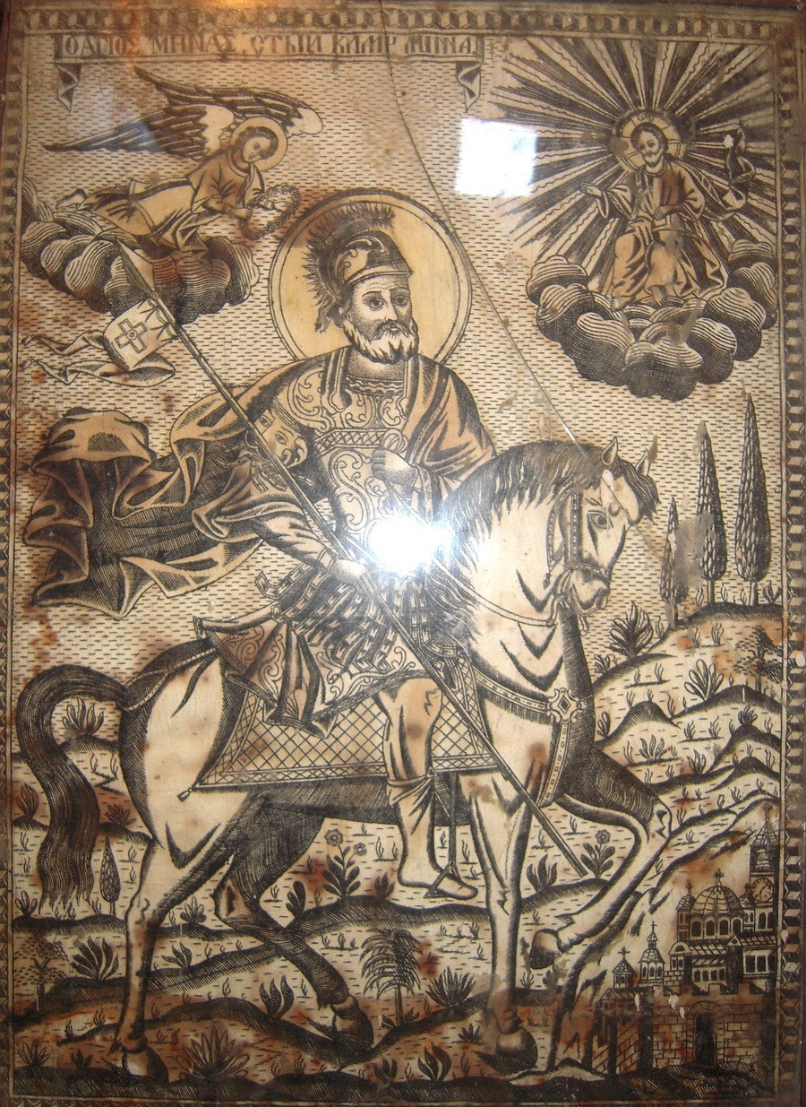 Црква „Свети Никола“, село Чепигово: Графички лист Свети Мина.